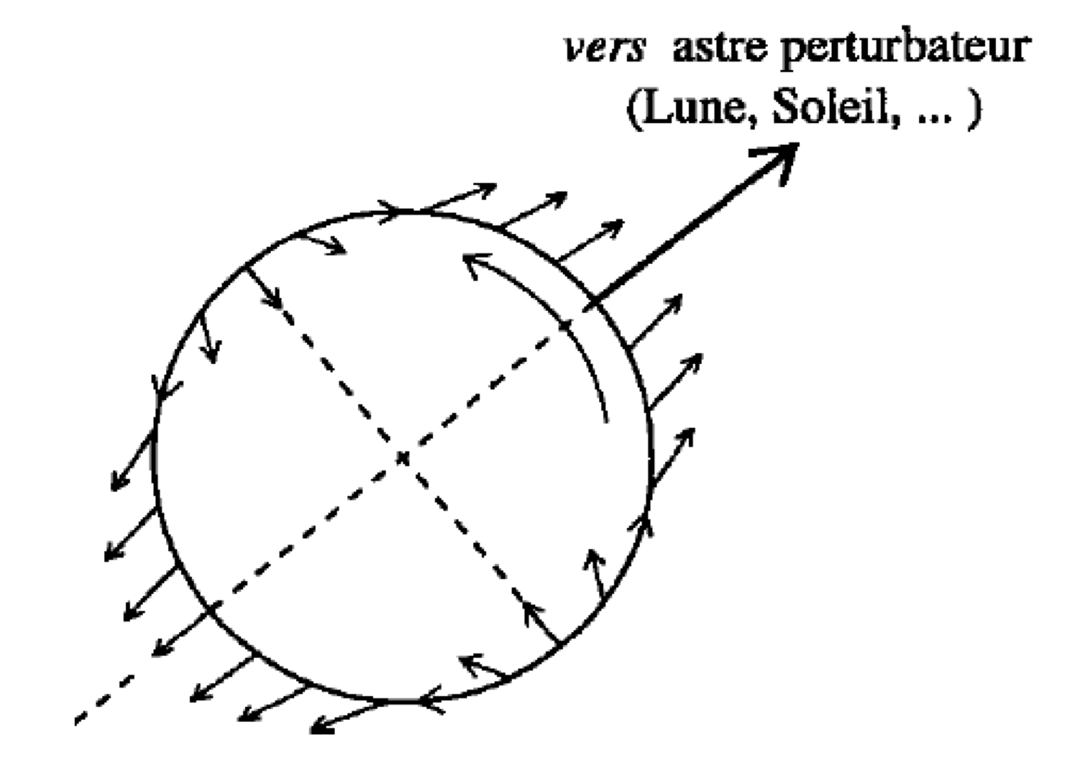 Description : Géométrie de la force de marée correspondant au potentiel de marée W2.